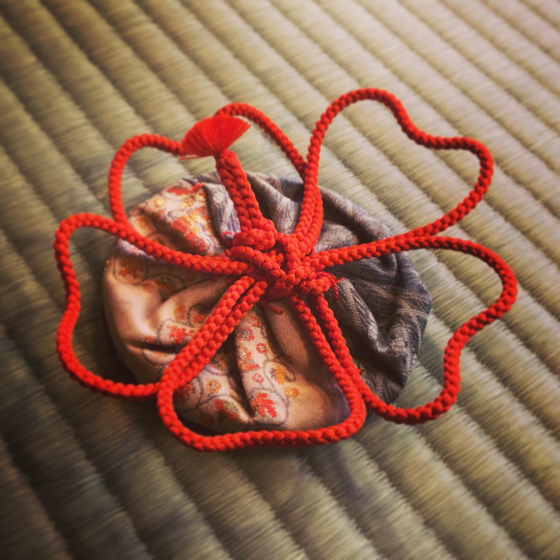 志野袋の花結びで表二月に使用する桜花の結び。